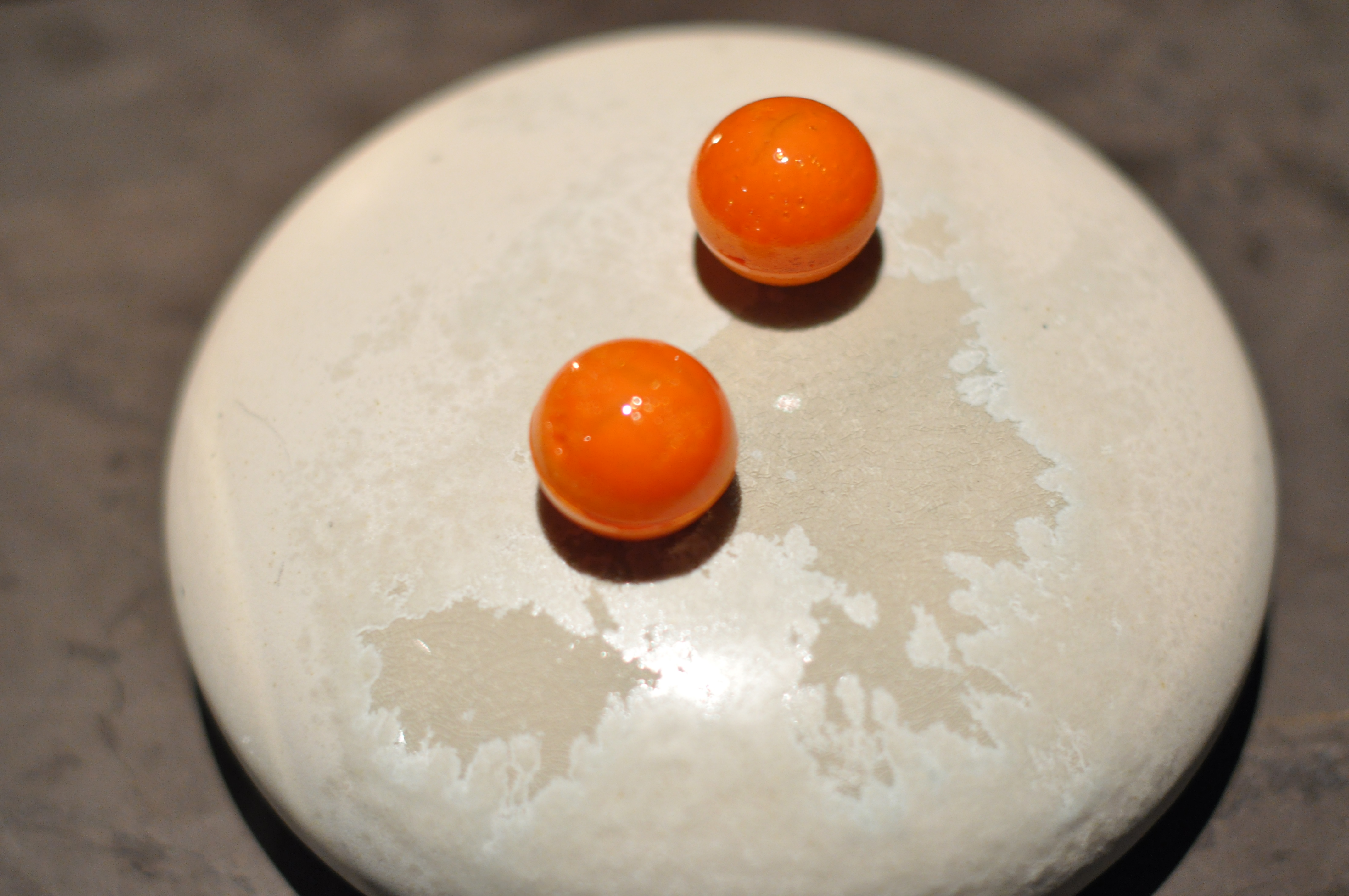 Gulerod og havtorn